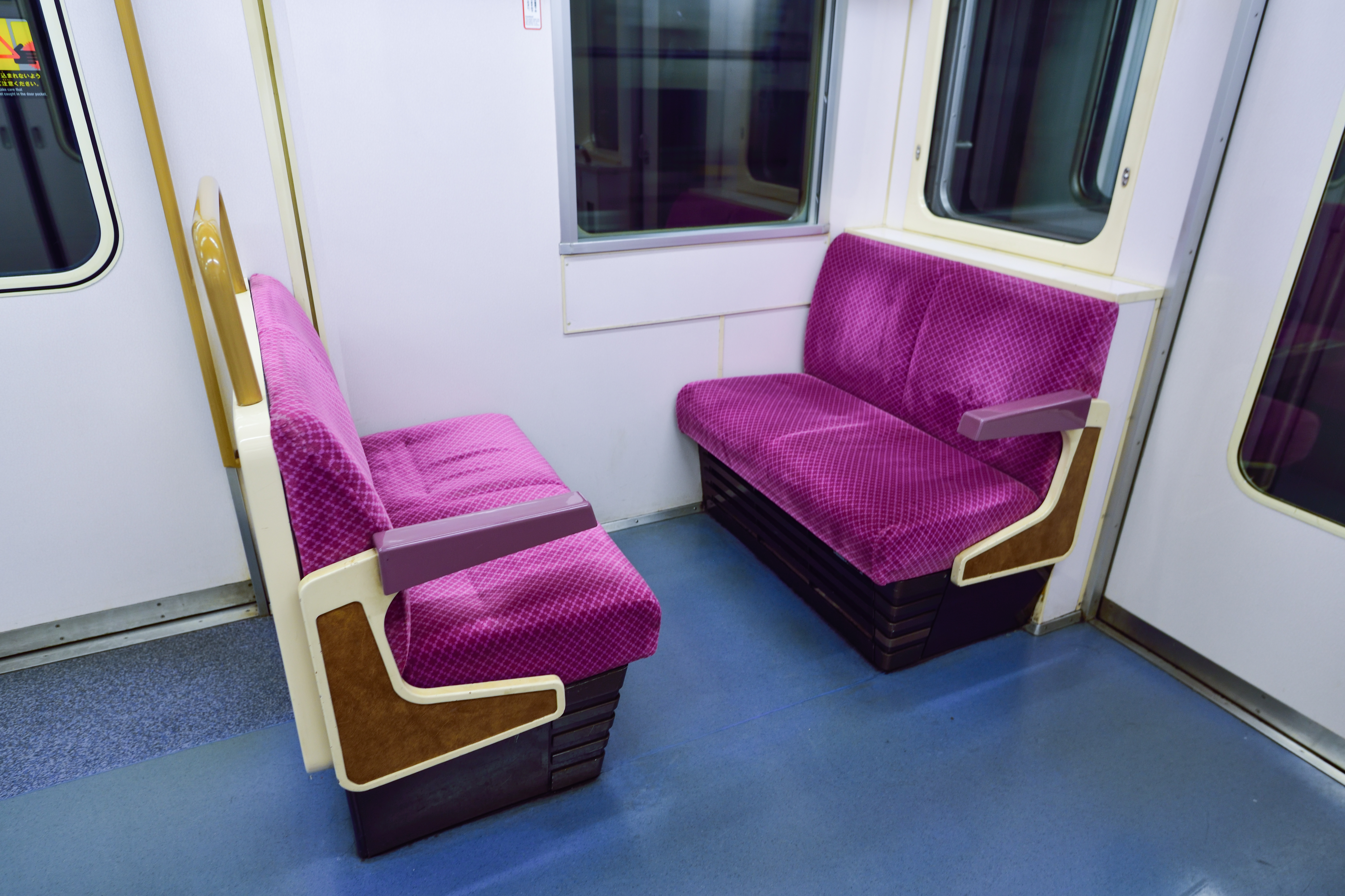 営団9000系。優先席とボックス席（試作車）。